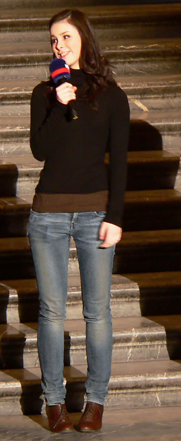 Lena Meyer-Landrut, Empfang im Neuen Rathaus von Hannover.